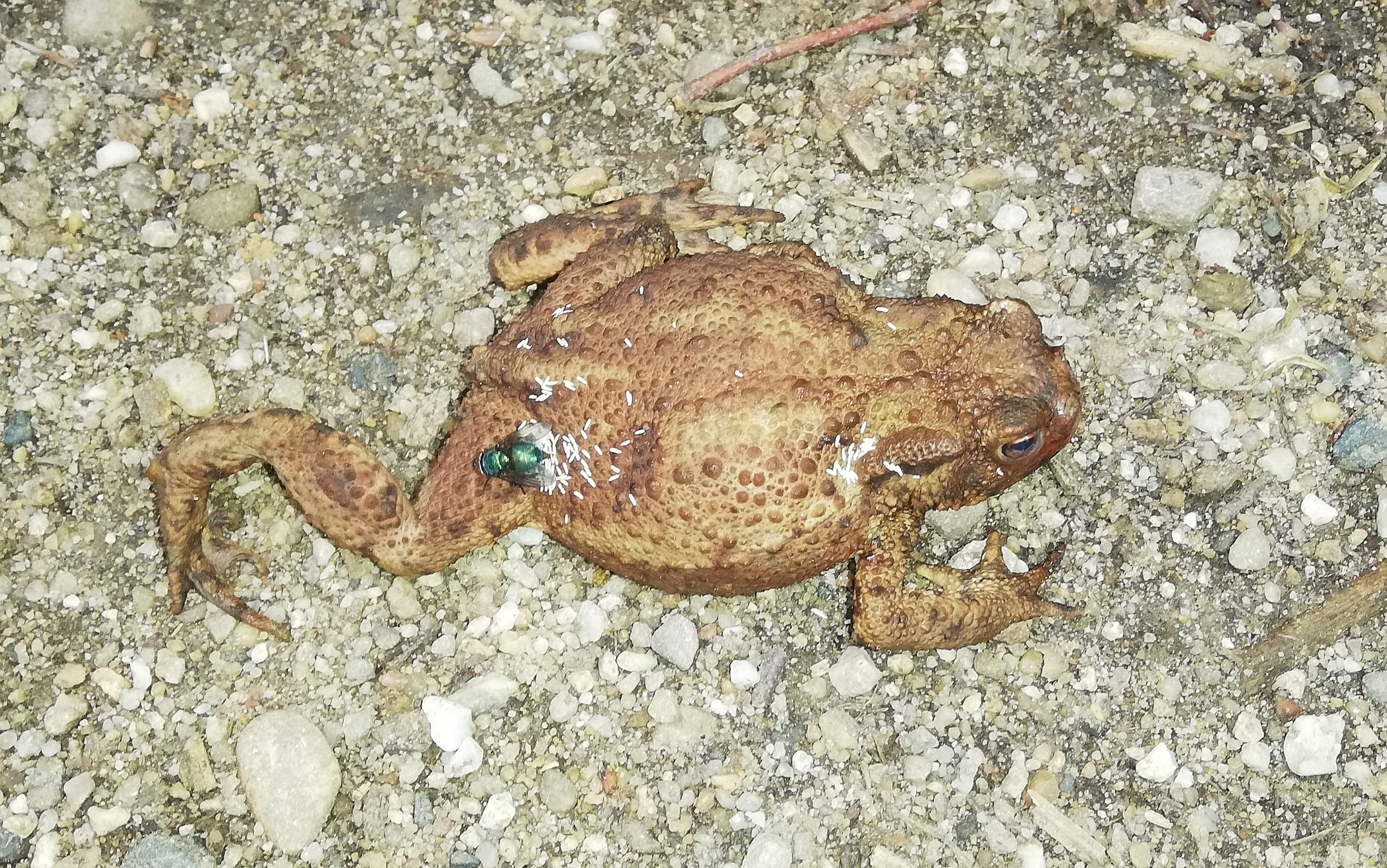 Erdkröte mit Goldlfiegenbefall, cf. Lucilia bufonivora, inkl Eipakete und Larveb und Fliegenimago, evtl. bei der Eiablage